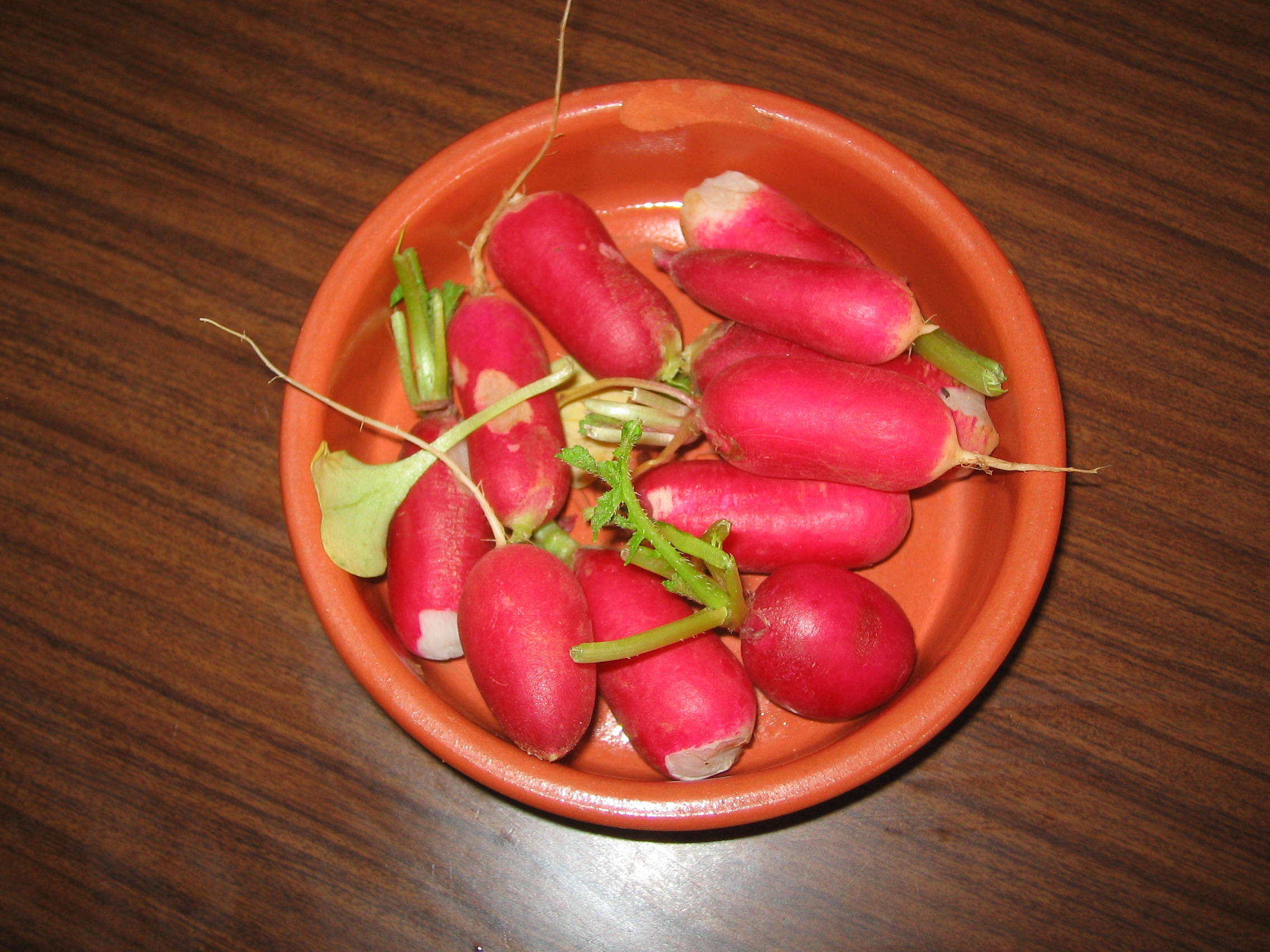 Turnips